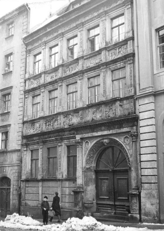 Görlitz, Neiße-Straße, Renaissancebau Zentralbild Klein 11.5.52 Stadtbilder aus Görlitz. Durch die Unterstützung unserer Regierung werden die alten Kulturbauten der Stadt Görlitz erhalten und instandgesetzt. UBz: Dieser Renaissancebau in der Neis-str. 29 wurde wieder hergestellt.